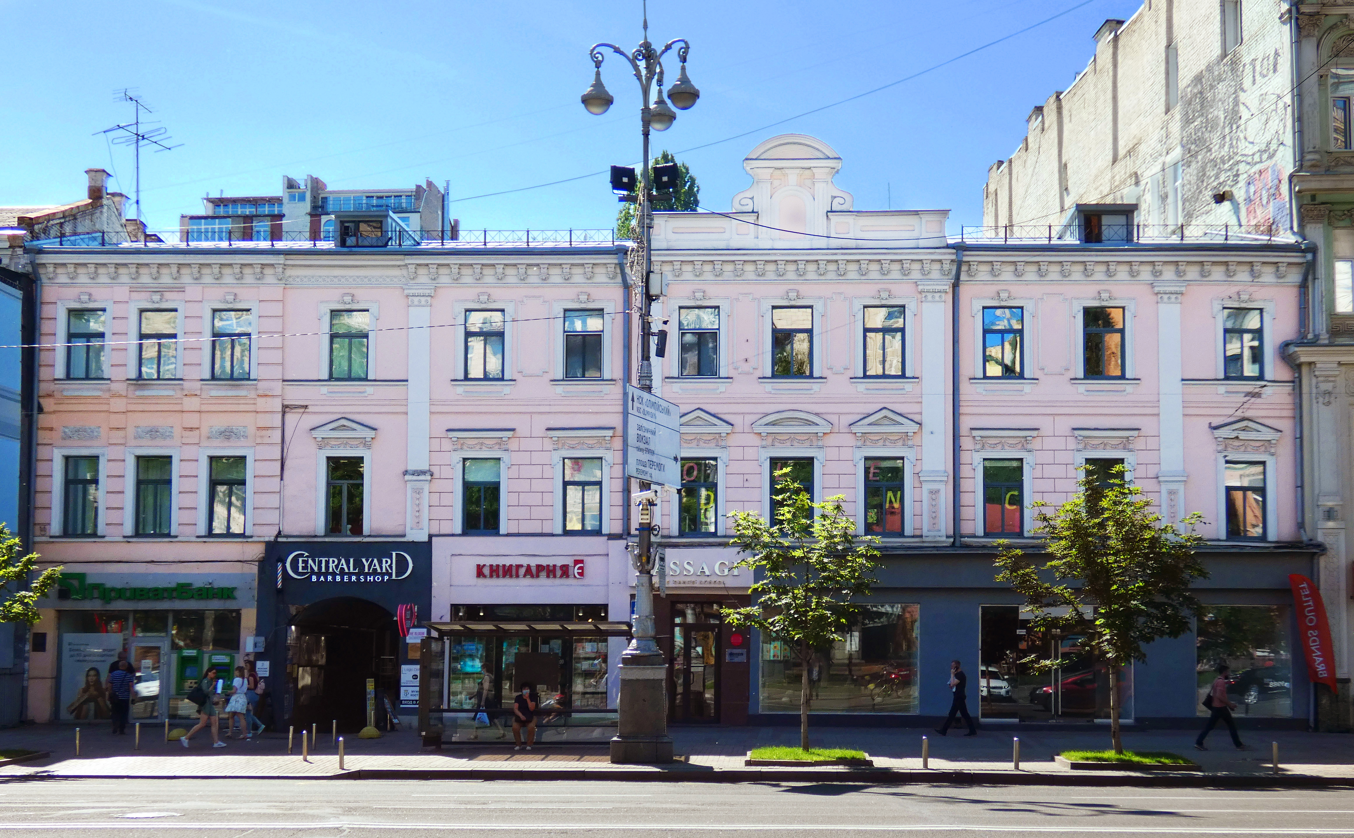 Прибутковий будинок, Київ, вул. Хрещатик, 46